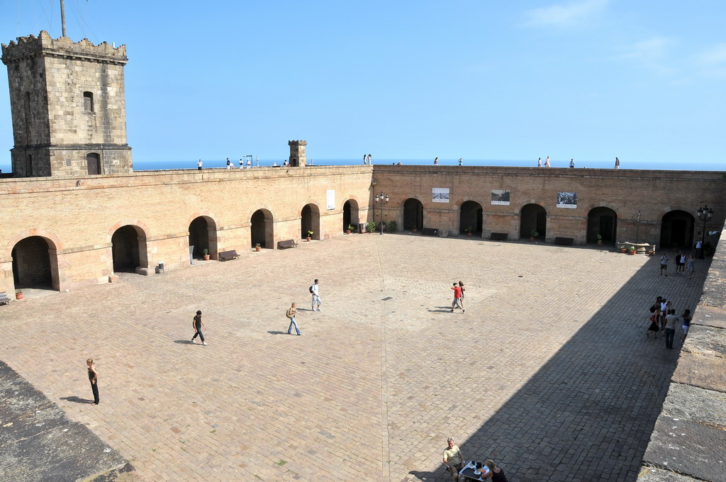 Das Castell de Montjuïc ist eine Burg aus dem 18. Jahrhundert und steht auf der Spitze des Montjuic. Das ehemalige Militärgefängnis beinhaltet heute ein Militärmuseum.